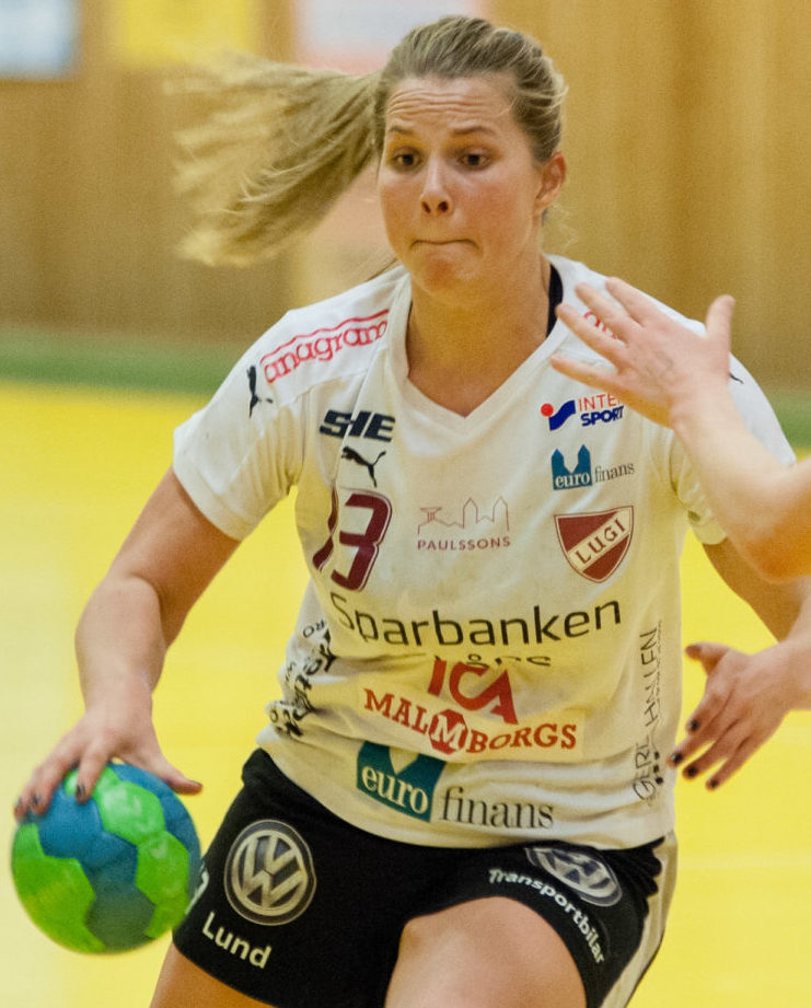 Ebba Engdahl, LUGI